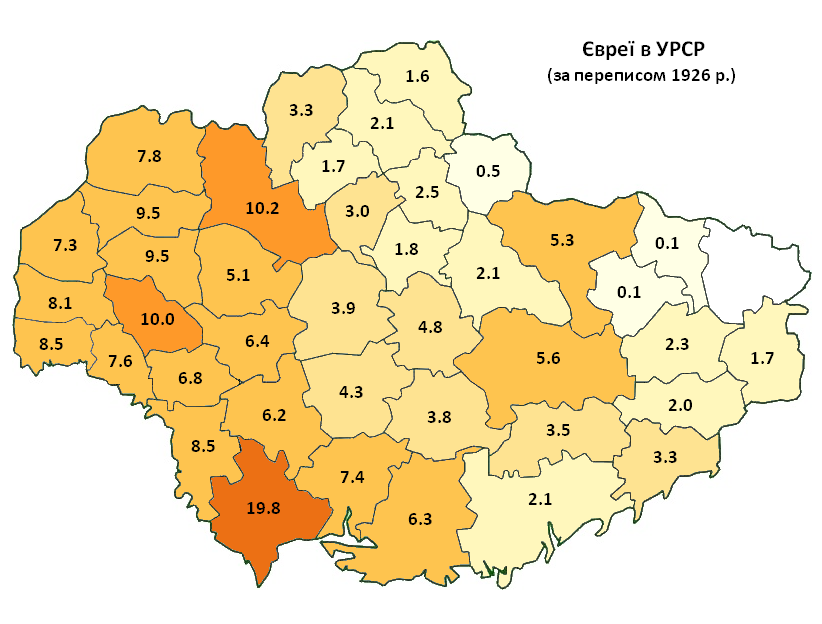 Розселення євреїв в УРСР за даними перепису 1926 р. / Jews in Ukrainian SSR according to 1926 census